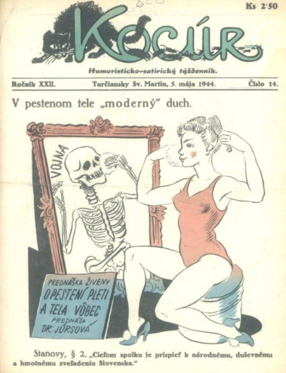 Titulný list humoristického časopisu Kocúr.